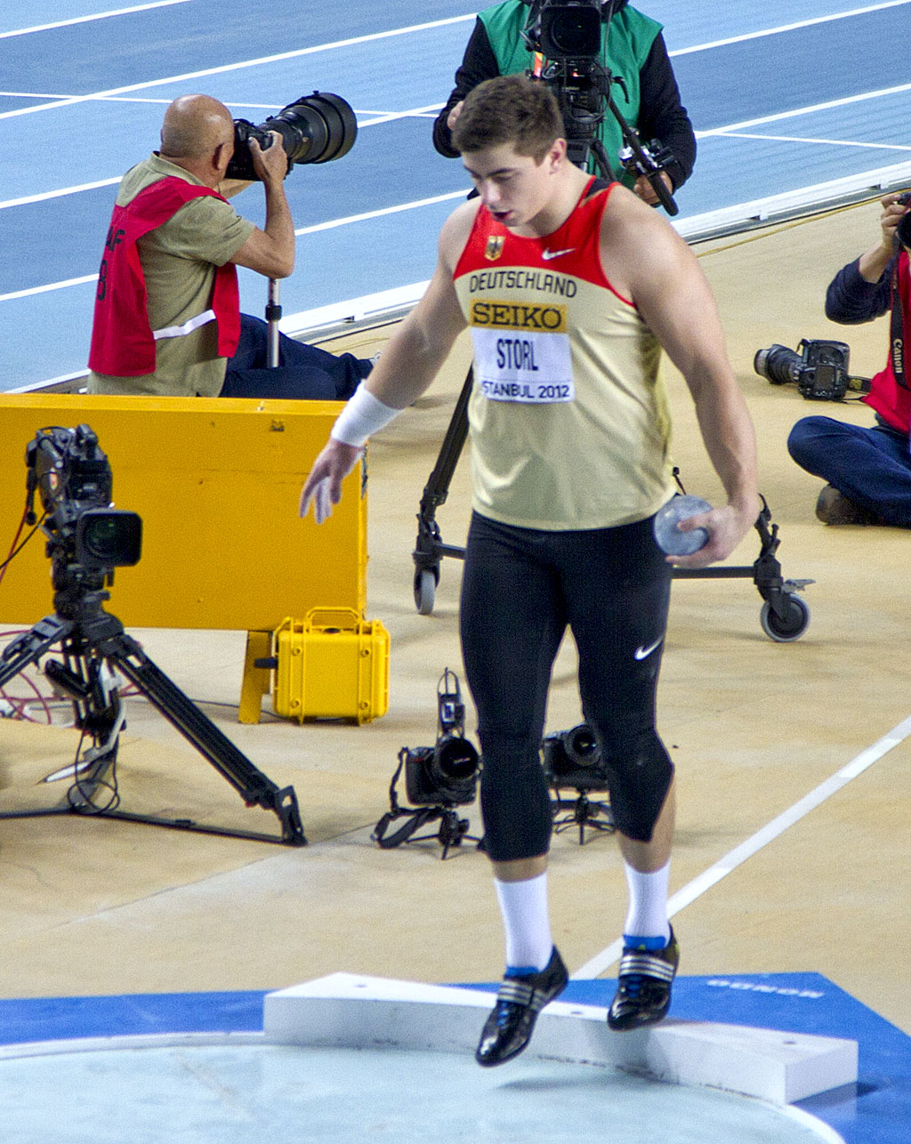 147 david storl 2e met de kogel